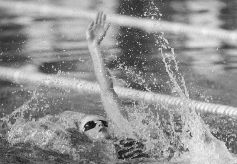 Birte Weigang ADN-ZB Link 2-4-83 Berlin: Birte Weigang (SC Turbine Erfurt) wurde nach Abschluß des 29. NOK-Schwimmfestes mit der begehrten Trophäe für ihre 2:11,90 min über 100 Meter Rücken ausgezeichnet.